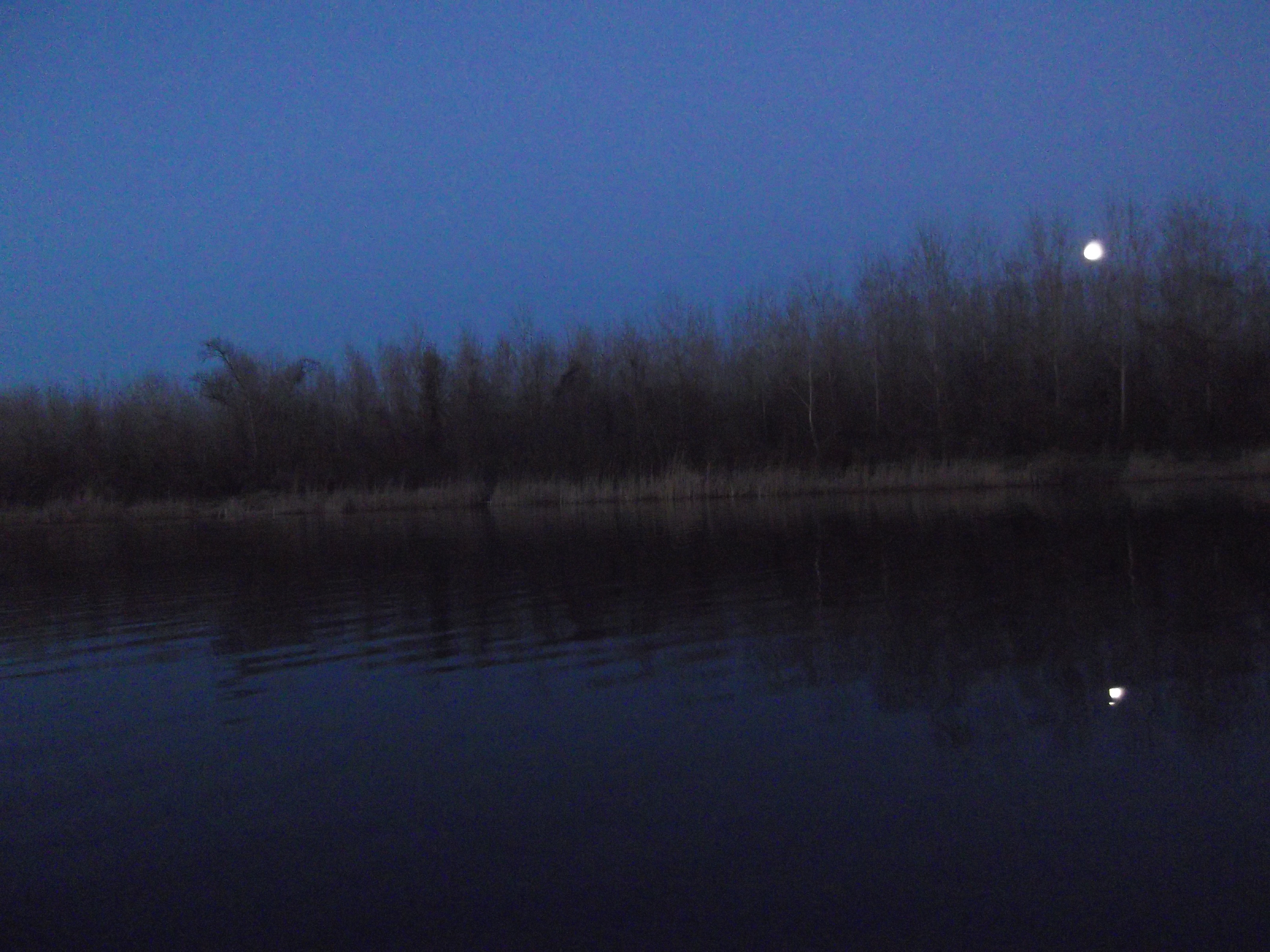 Holdkelte Kengyián a Bajai-csatorna felett (Szerbia)